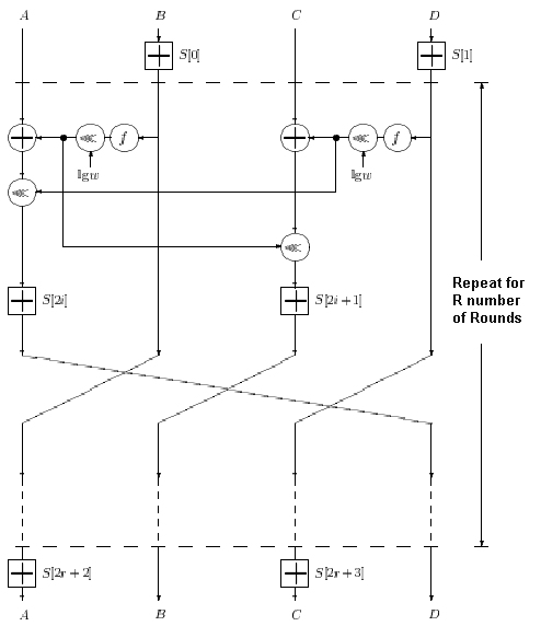 Монгол: RC6